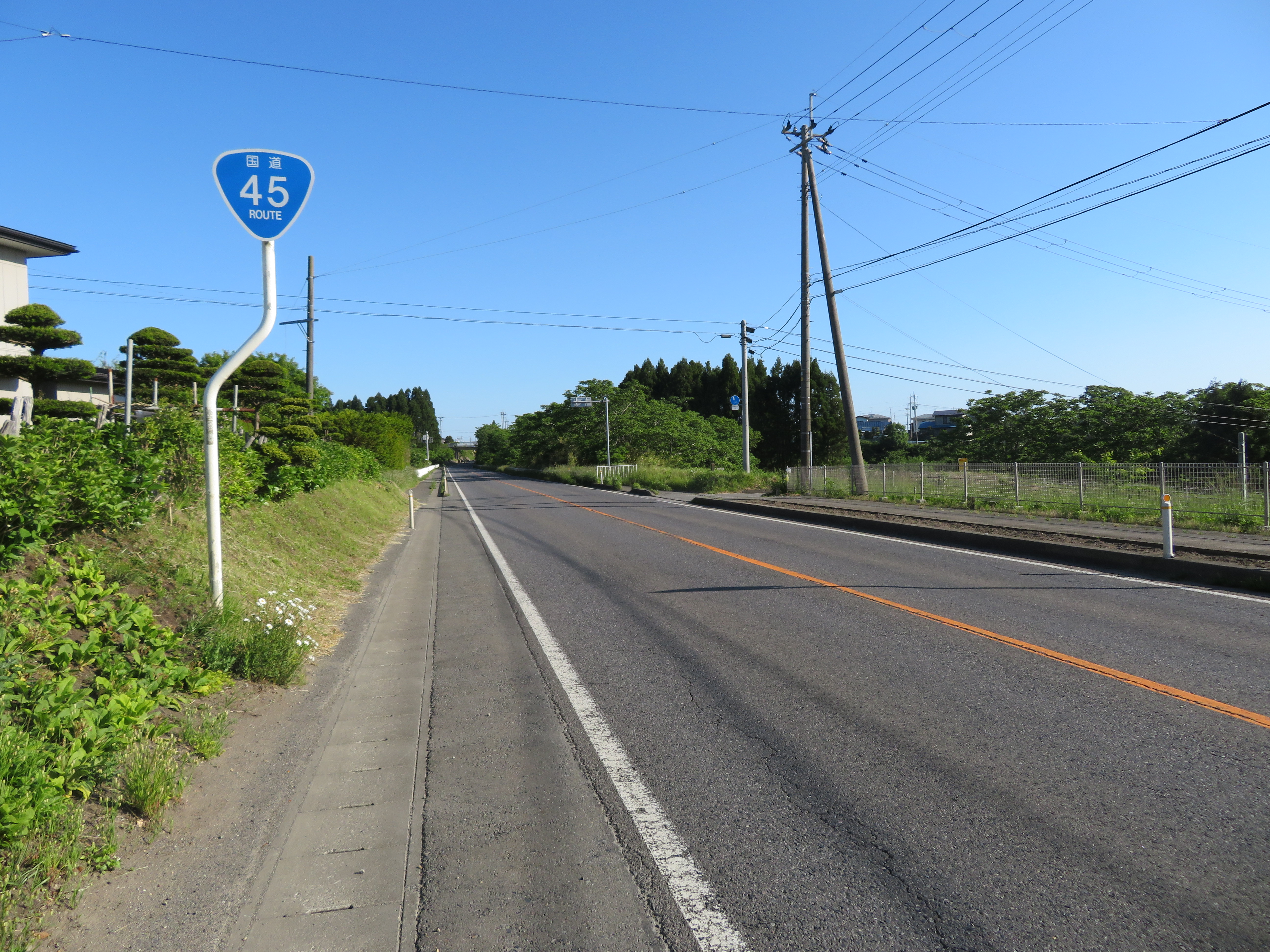 国道45号種市バイパス岩手県九戸郡洋野町種市第20地割付近（八戸方面を撮影） Canon PowerShot SX720 HS